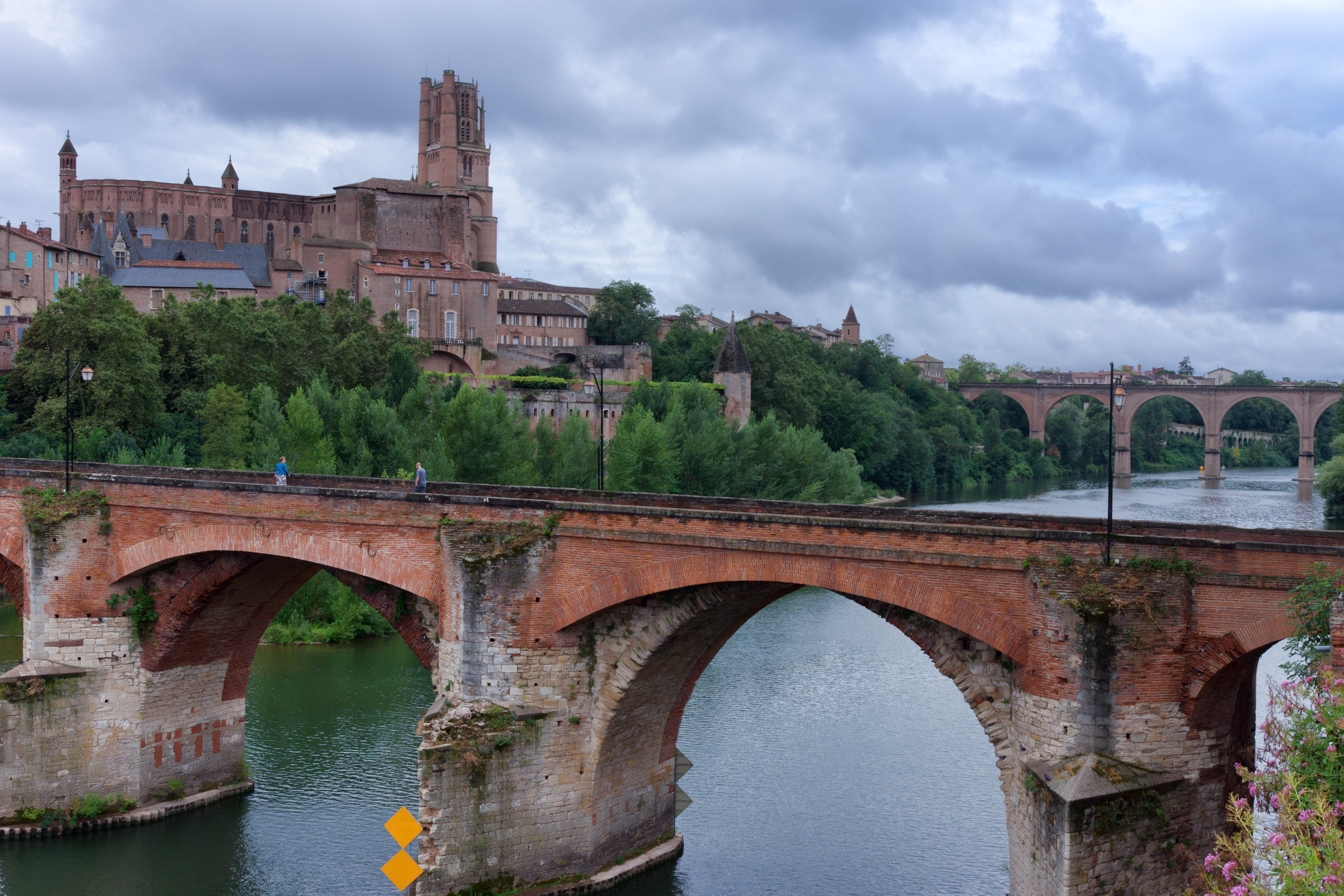 Albi - Vieux pont et cathédrale